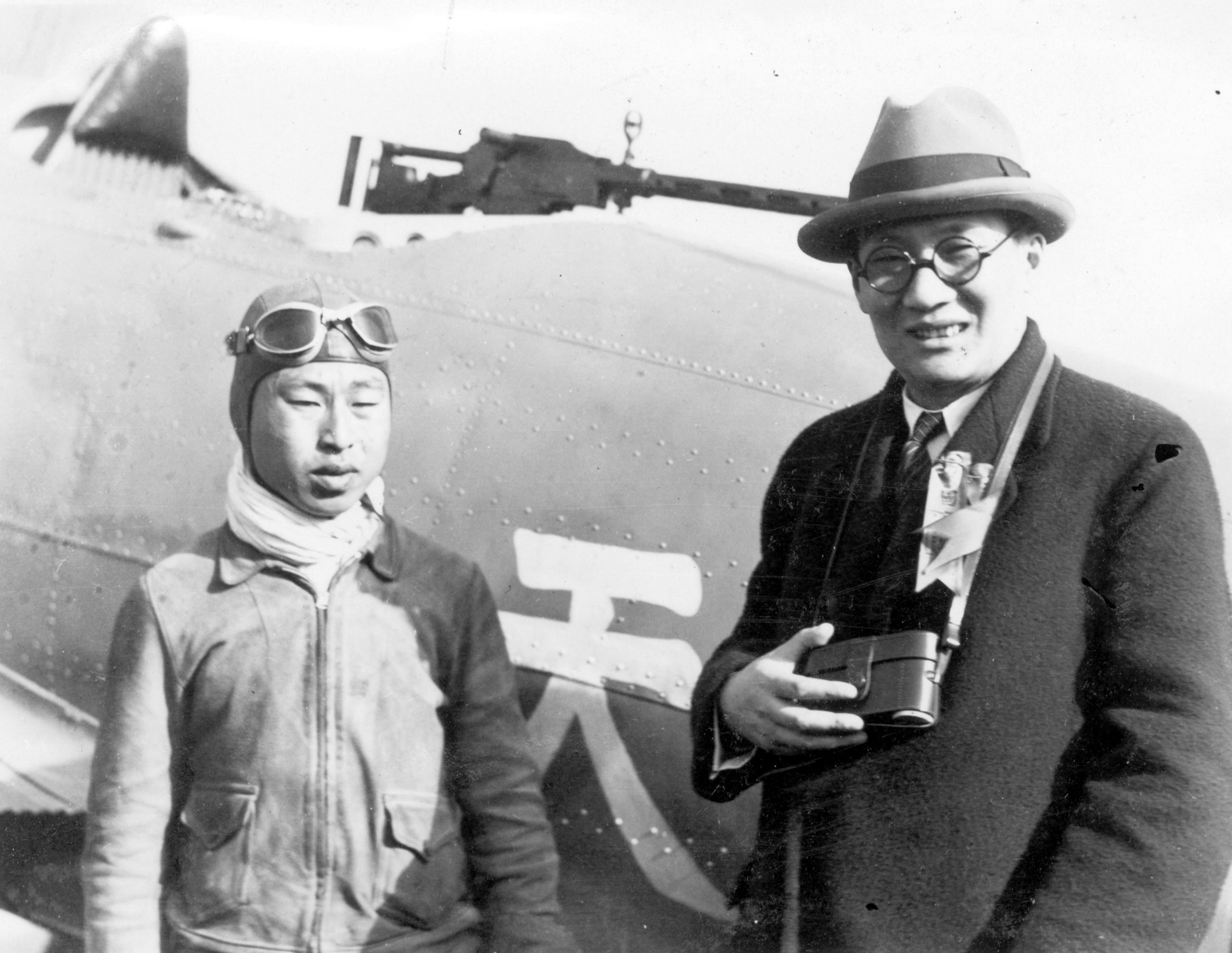 上海市長時代の呉鉄城と飛行演技を終えた直後の高志航